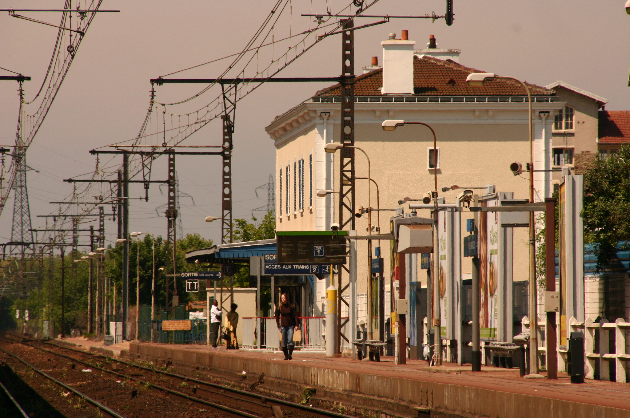 La Gare de Ris-Orangis, Ris-Orangis, département l'Essonne, France